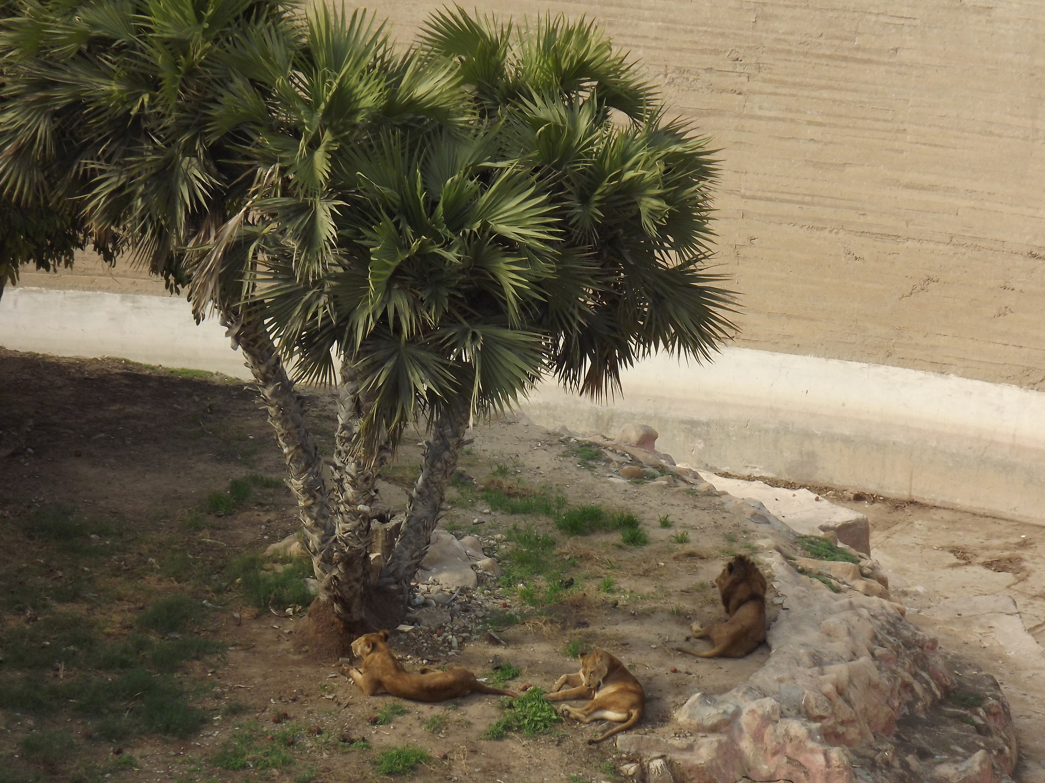 حديقة حيوان النزهة - الاسكندرية